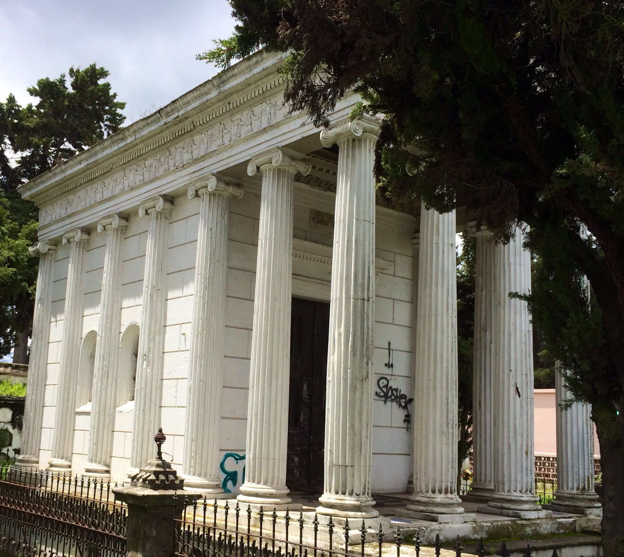 Tumba del president Manuel Estrada Cabrera en el Cementerio de Quetzaltenango en 2014.